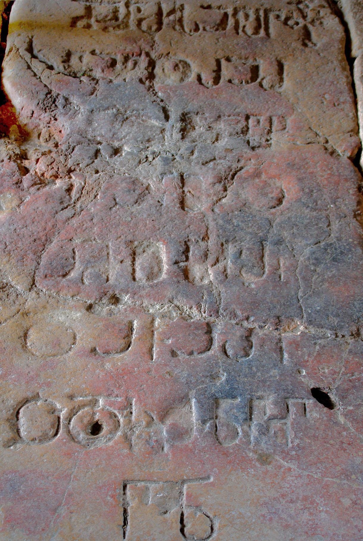 Gelati, asomtawruli inscription